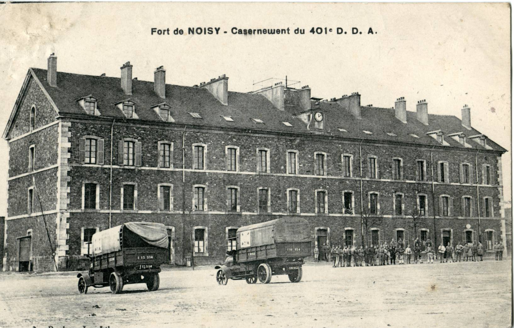 Carte postale ancienne Fort de Noisy (situé à Romainville) : Casernement du 401e D.D.A.